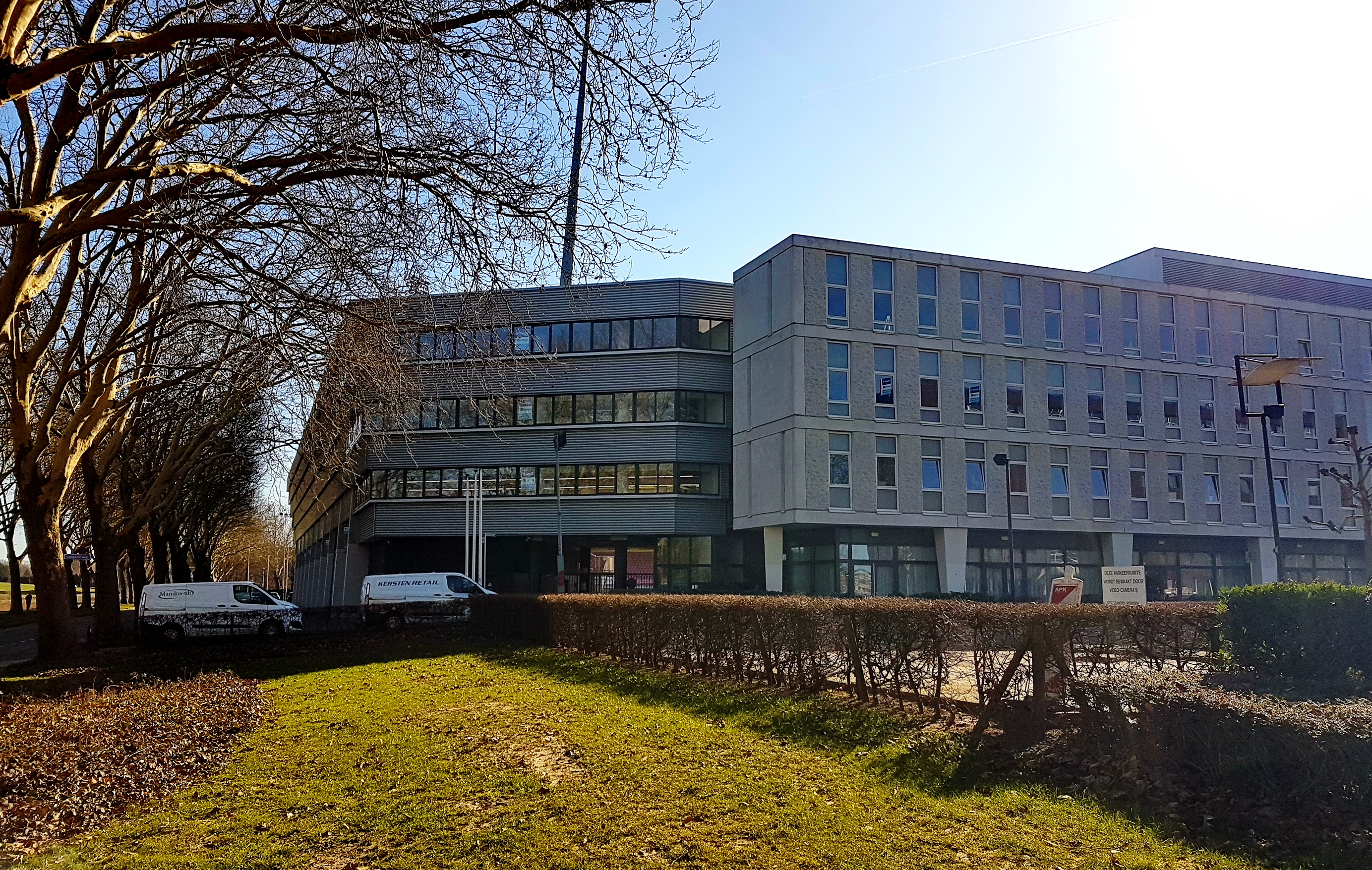 Zicht uit het noorden op het stadion en business centre De Geusselt in het Geusseltpark in Maastricht-Oost.